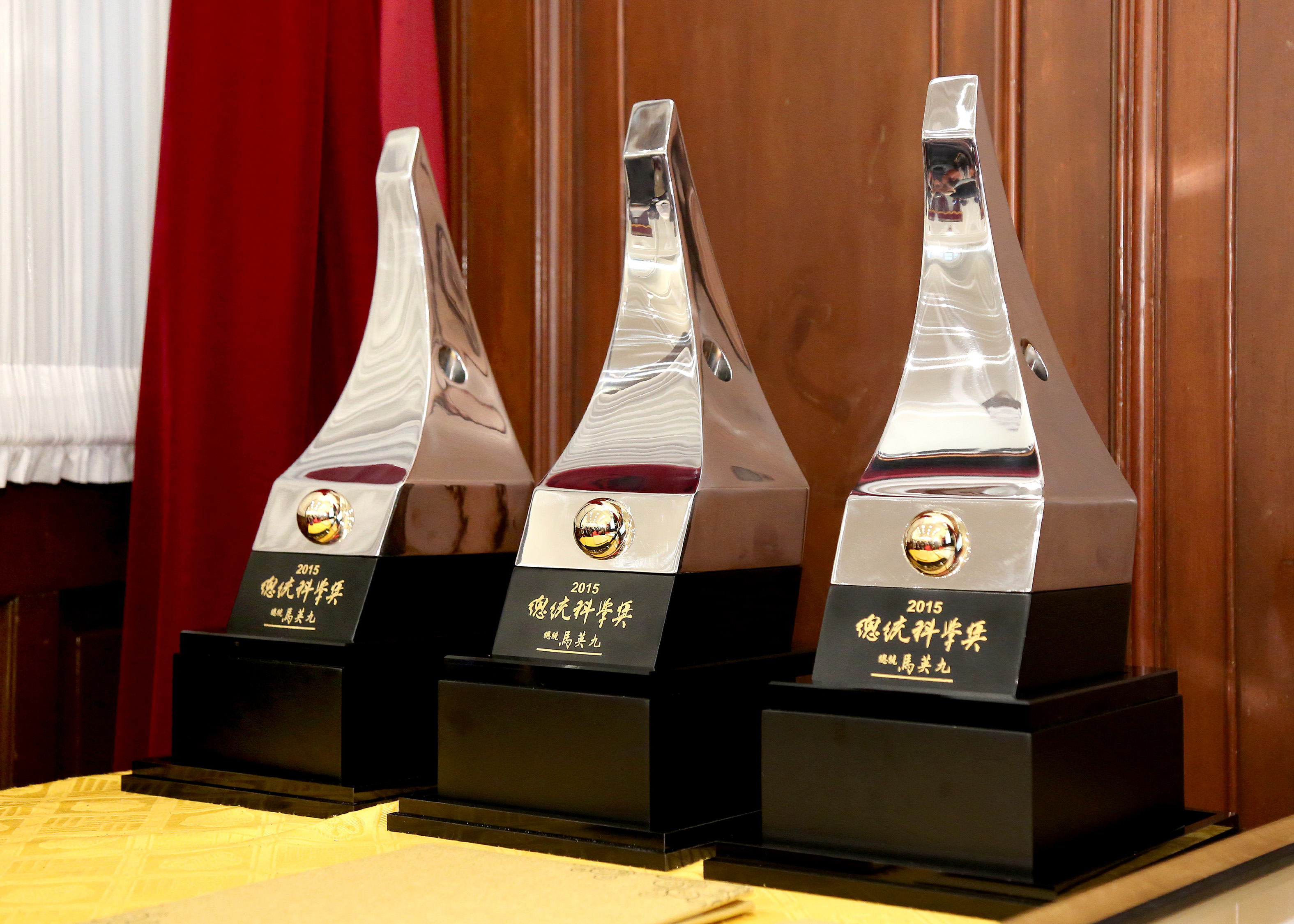 中華民國「2015總統科學獎」獎座三座，底座印總統馬英九簽名。